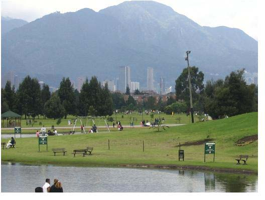 Vista de Bogotá hacia los Cerros Orientales desde el Parque Central Simón Bolívar; al fondo (izq.) se puede apreciar el cerro de Guadalupe. Bogotá es una ciudad que irradia verdor intenso y natural debido al clima frío que la caracteriza (Temperatura promedio 15ºC, 57ºF) y que le da una atmósfera de permanente primavera. Image Copyrights: © 2005 Carlos Tequendama Fotografía tomada con una cámara Cannon PowerShot A75. Información contenida en la foto ha sido reducida con respecto al original.